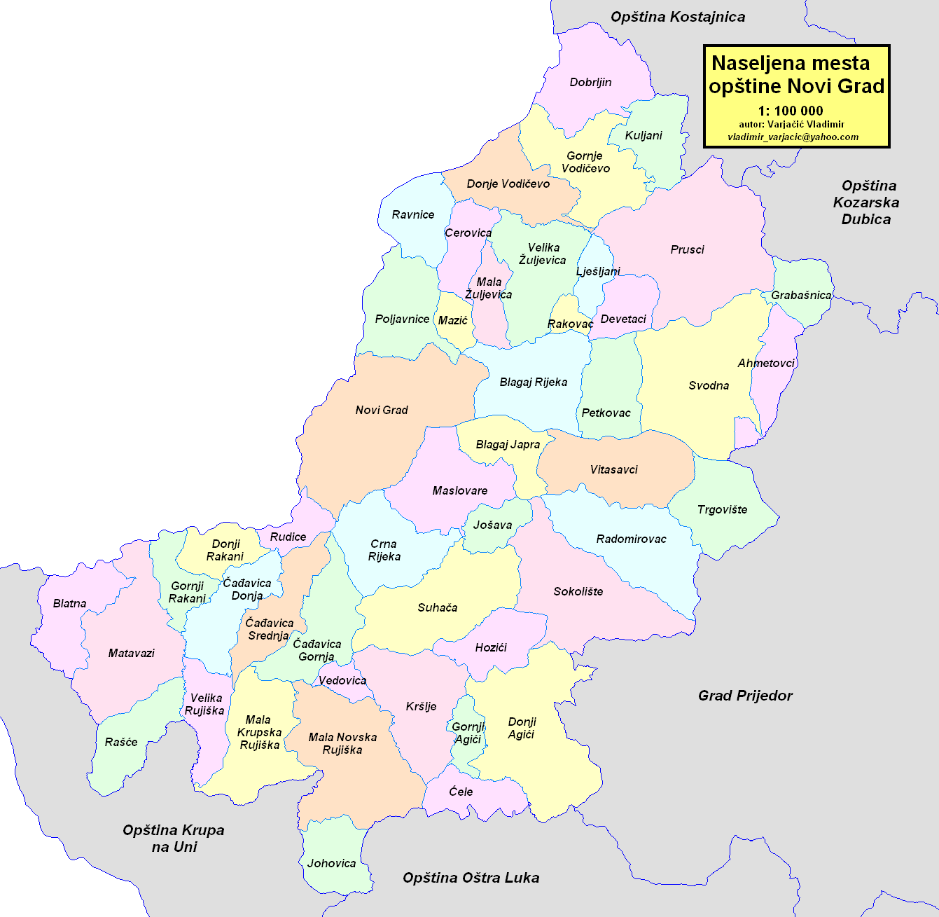 Opština Novi Grad